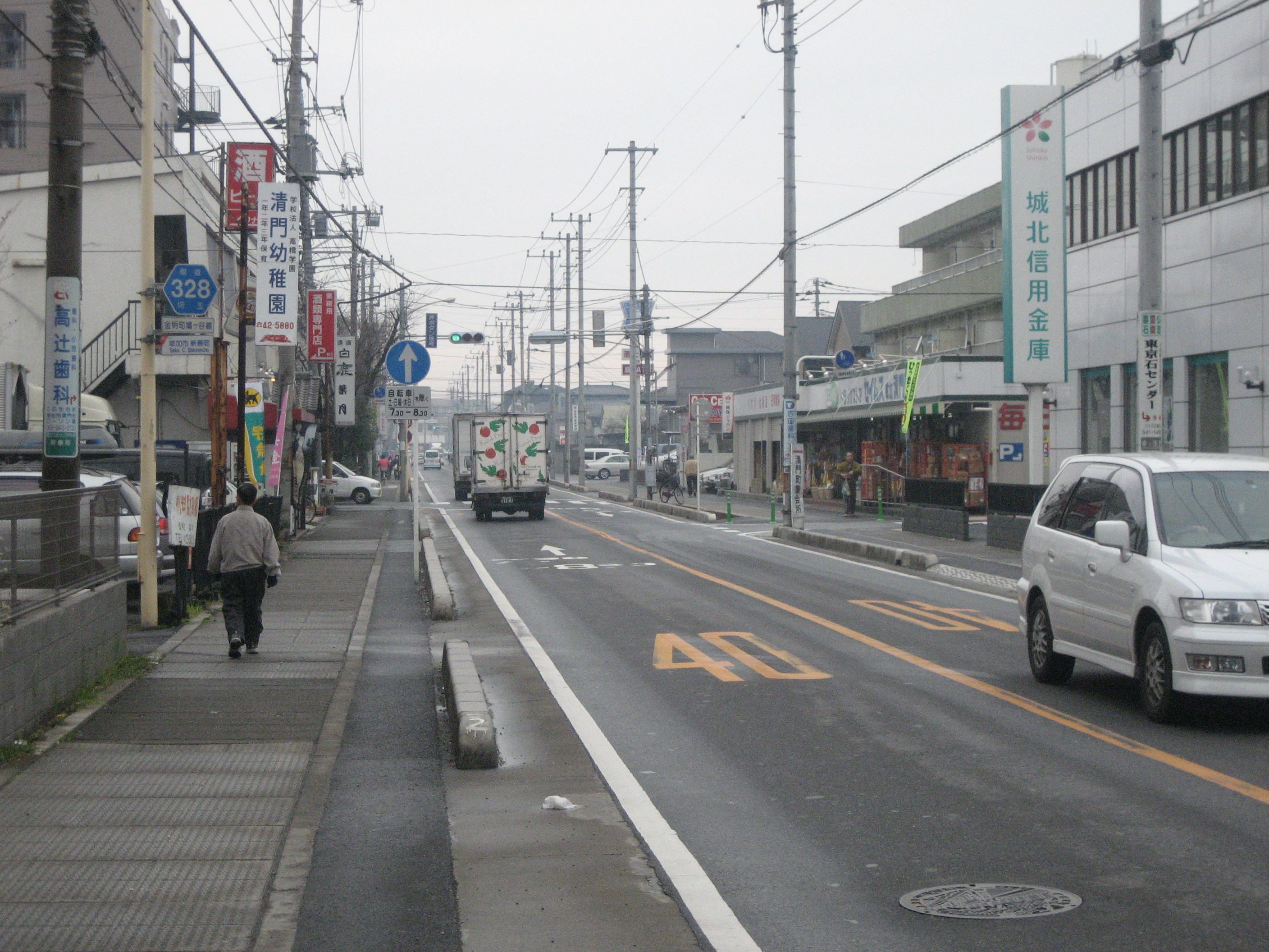 埼玉県道328号線草加市内